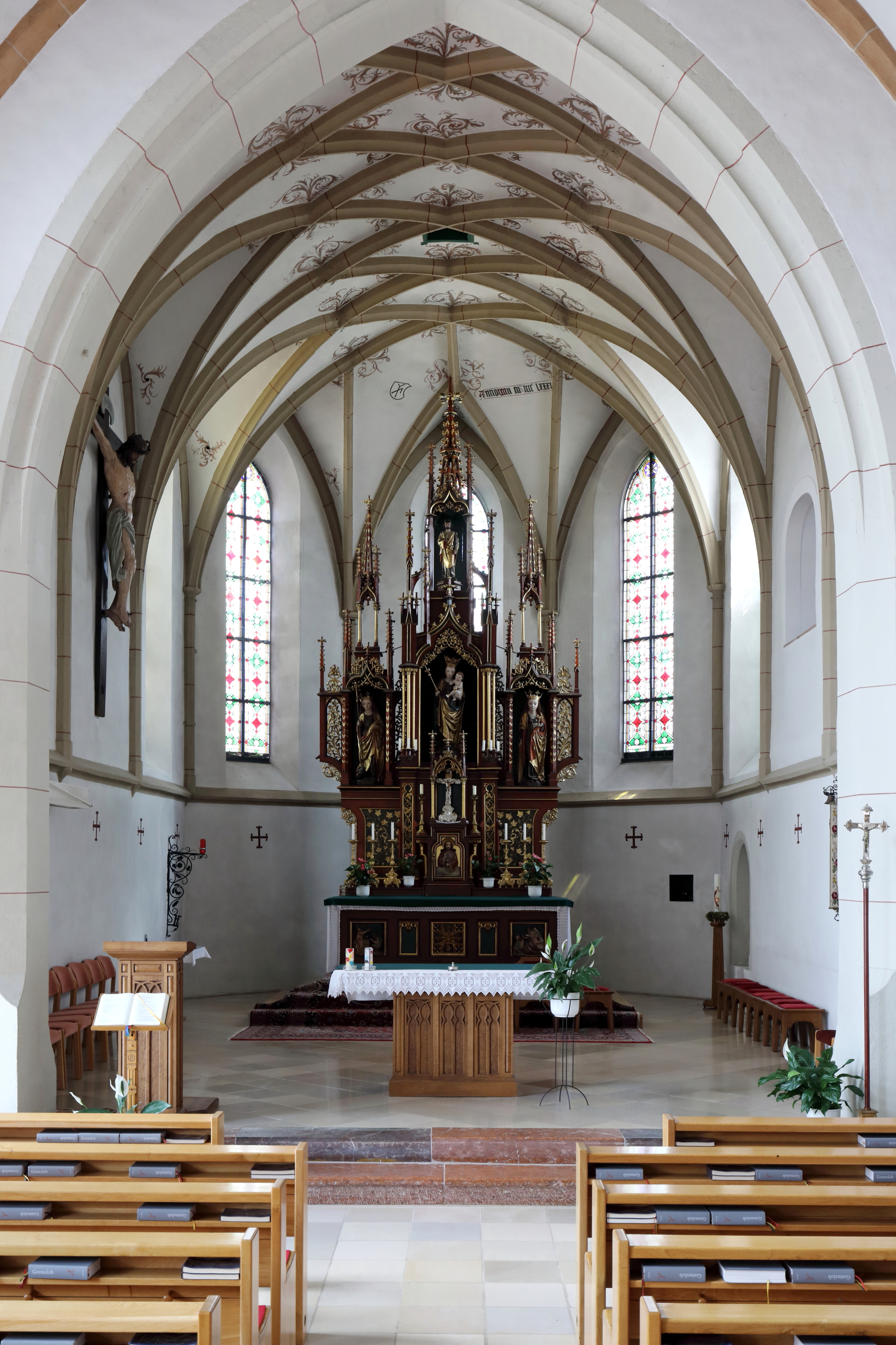 Blick in den Altarraum (Chorraum) der röm.-kath. Pfarrkirche Hl. Jakobus der Ältere in der oberösterreichischen Marktgemeinde Seewalchen am Attersee.Die spätgotischen ornamentale Fresken im Netzrippengewölbe des Chorraumes wurden 1954 freigelegt. Im neugotischen Hochaltar befinden sich spätgotische Holzfiguren aus den Jahren 1470 bis 1480.